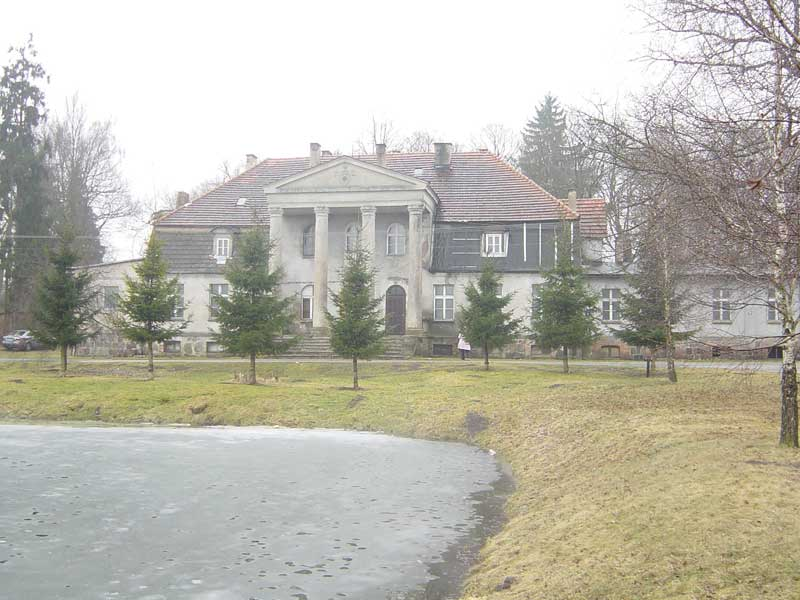 Zbeniny-front pałacu